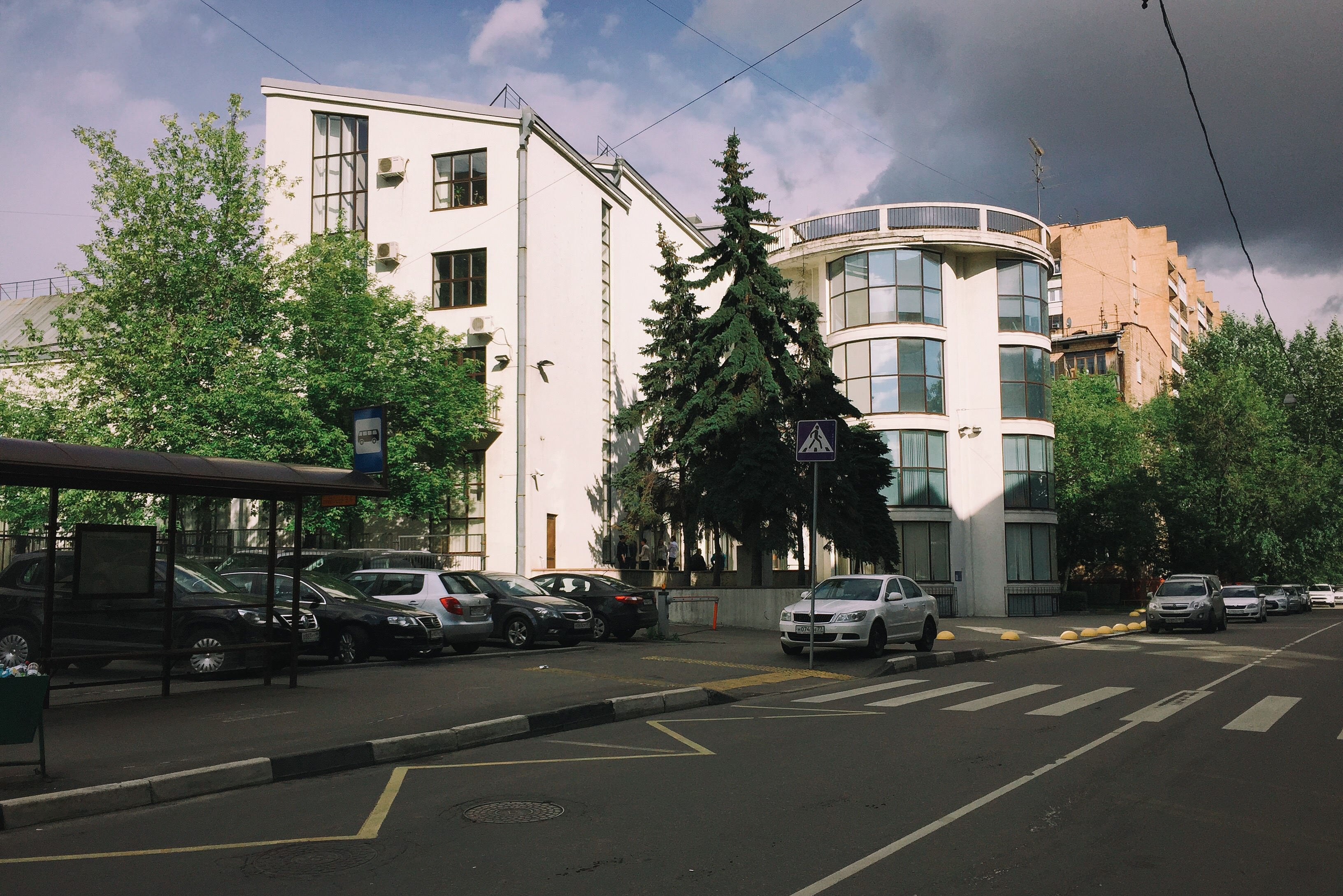 3-я Рыбинская улица. Клуб Буревестник